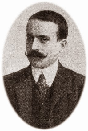 Fotografia de l'Alcalde de València, Diputat a les Corts i fundador d'Esquerra Valenciana, Faustí Valentí i Torrejón